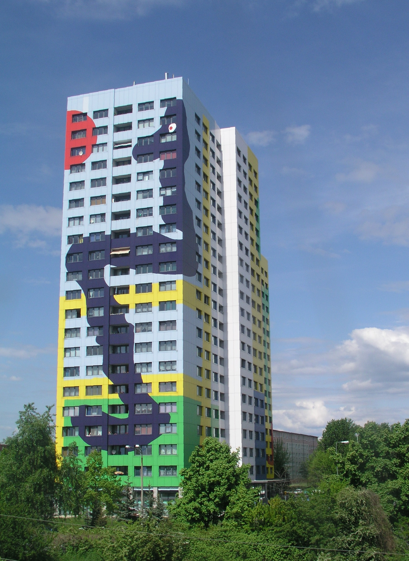 „Gustavo-Haus“ im Ortsteil Berlin-Fennpfuhl